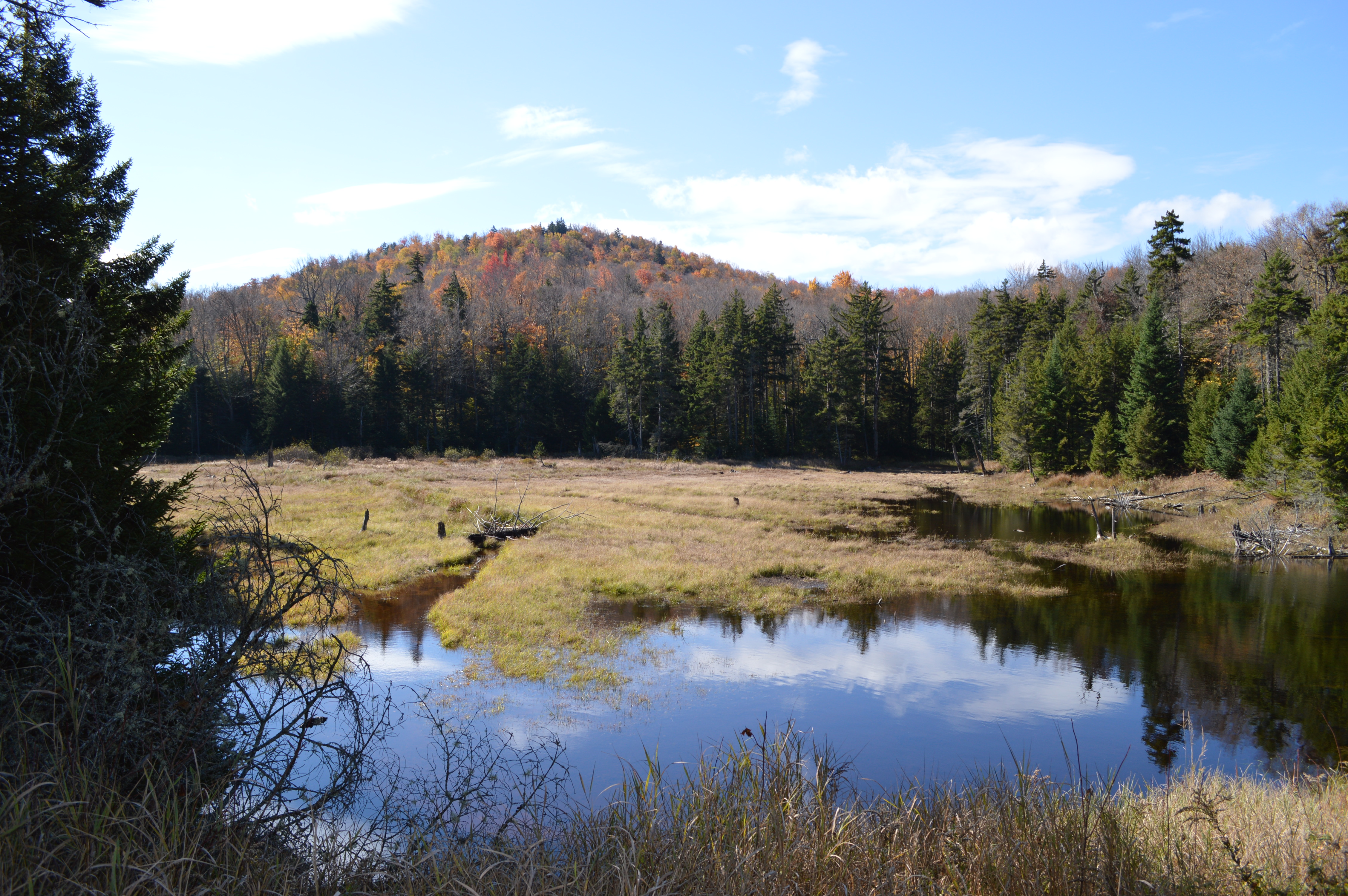 Colton, NY, USA